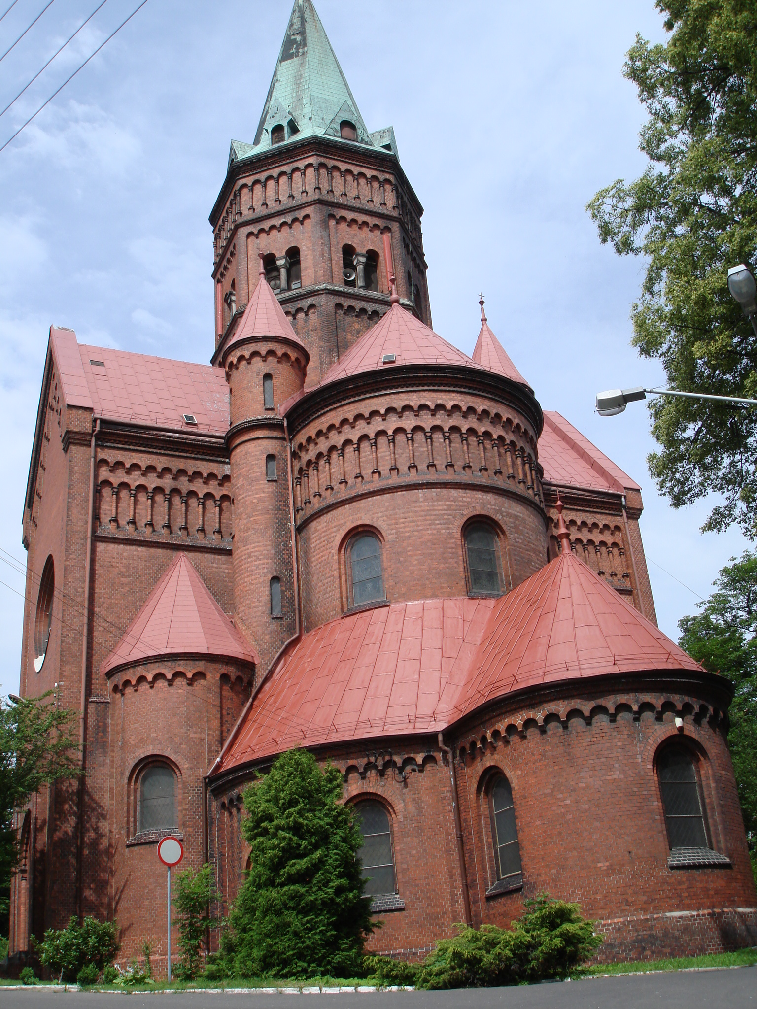 former St. George church in Biały Kamień